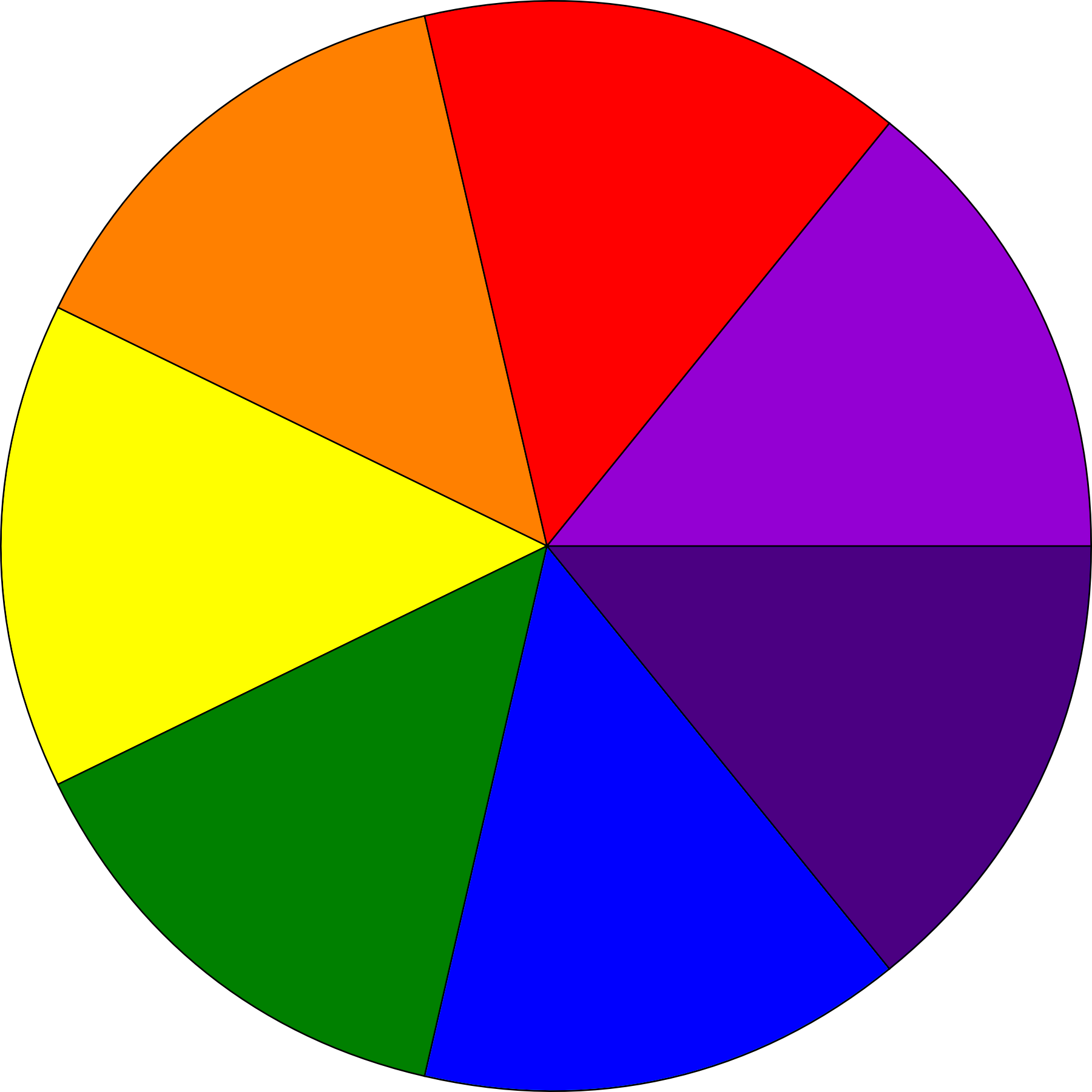 La rotation rapide de ce disque de 7 couleurs donne l'illusion d'une couleur uniforme grise. Cette expérience met en évidence que la lumière blanche peut être recomposée à partir de couleurs différentes.